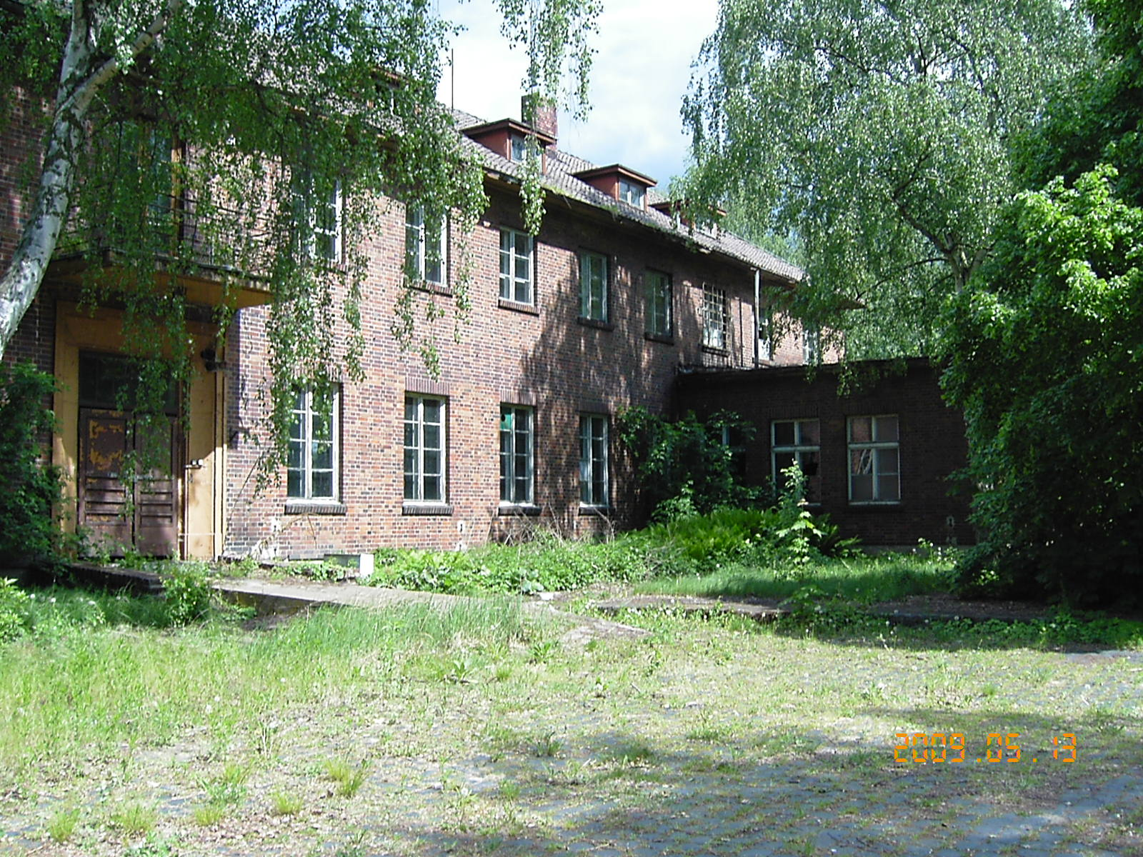 Byłe koszary WOP przy ulicy Przestrzennej w Szczecinie